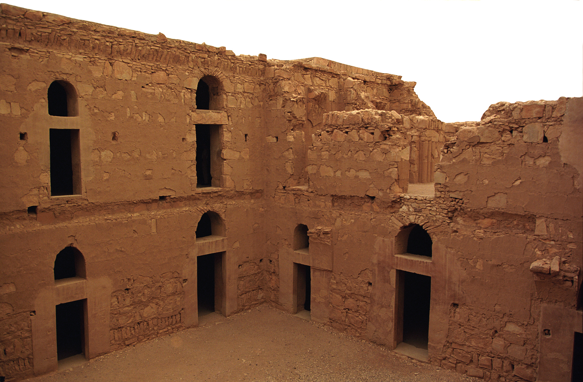 Qasr Kharana , Desert Castles - Jordan